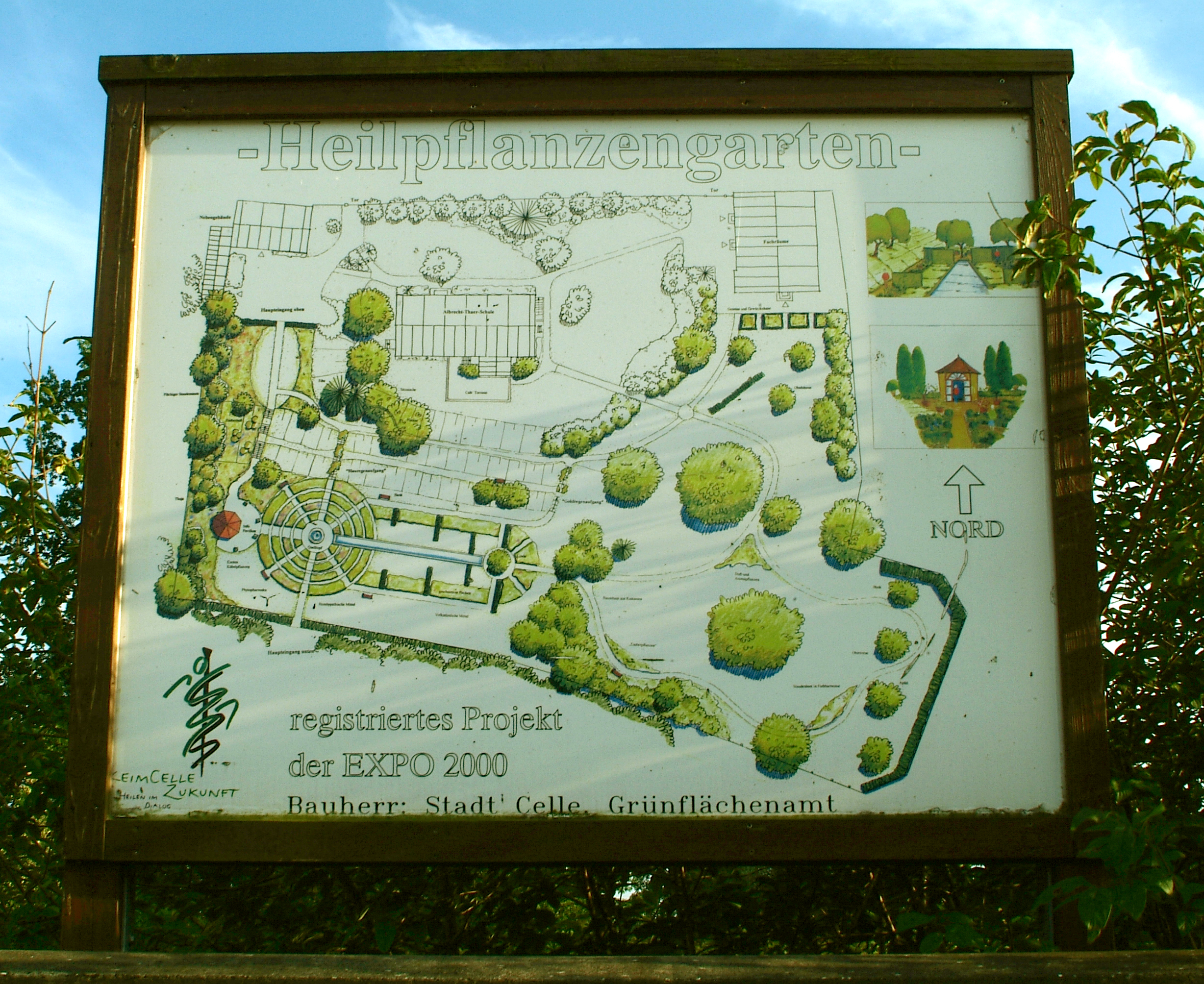 Der Heilpflanzengarten Celle zwischen Wittinger Straße und Allerwiesen ist einer der größten seiner Art in Europa. Auf dem Gelände mit dem Gebäude der ehemaligen Landfrauenschule wird von der Albrecht-Thaer-Schule die BBS IV betrieben mit der Fachschule für Landtourismus und Direktvermarktung. Im Café Thaer und im KräuThaer-Laden werden selbsterzeugte Produkte angeboten.